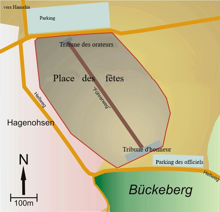 Carte du site de la fête des récoltes du Reich, en 1933